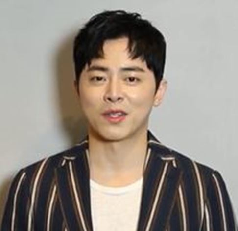 1894년 동학농민혁명의 소용돌이 속 새로운 세상을 꿈꾼 민초들의 이야기 녹두꽃 역사는 드라마다!